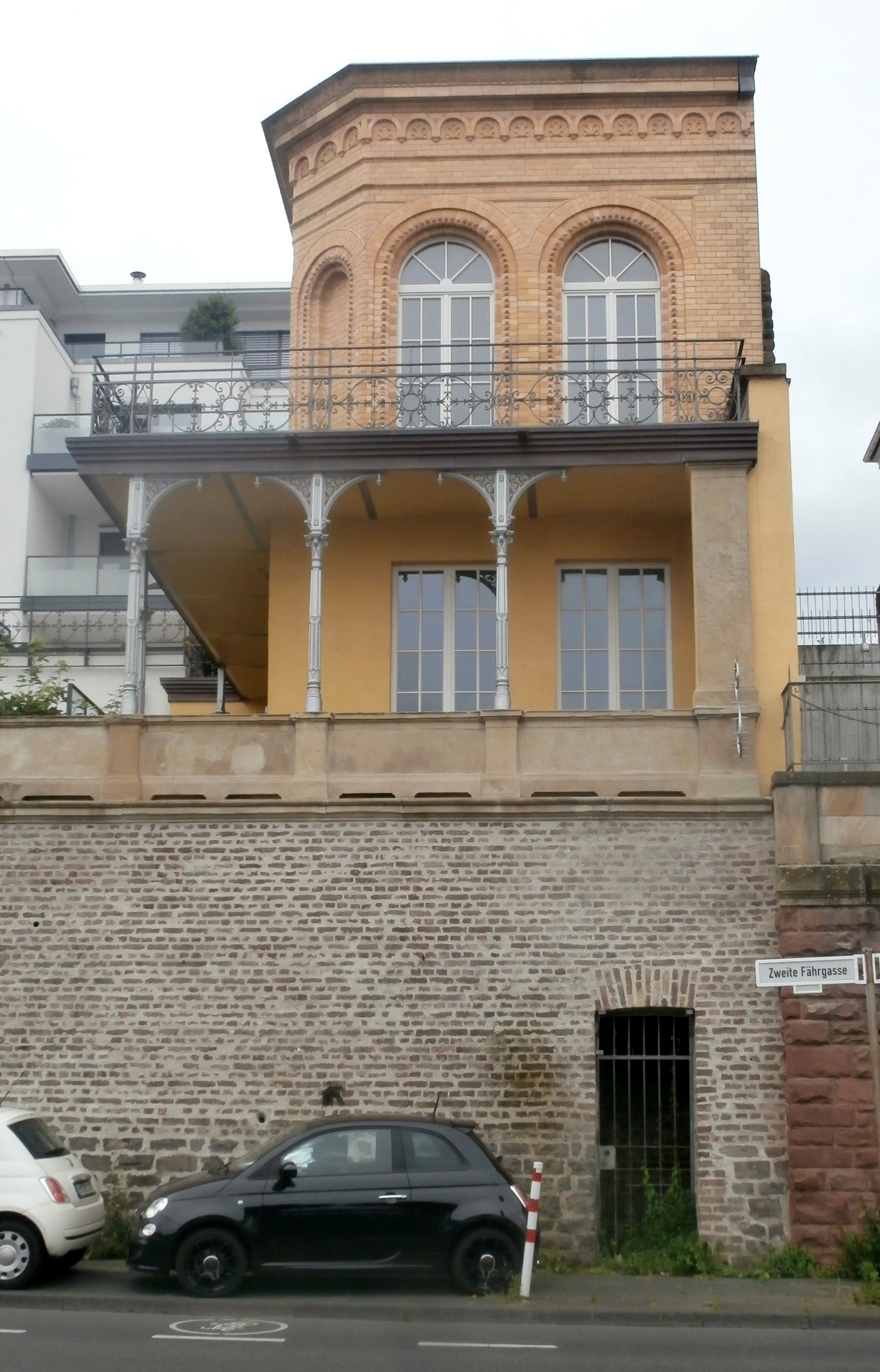 Gartenpavillon, Schaumburg-Lippe-Straße 6, Bonn-Südstadt: Ansicht vom Rathenauufer